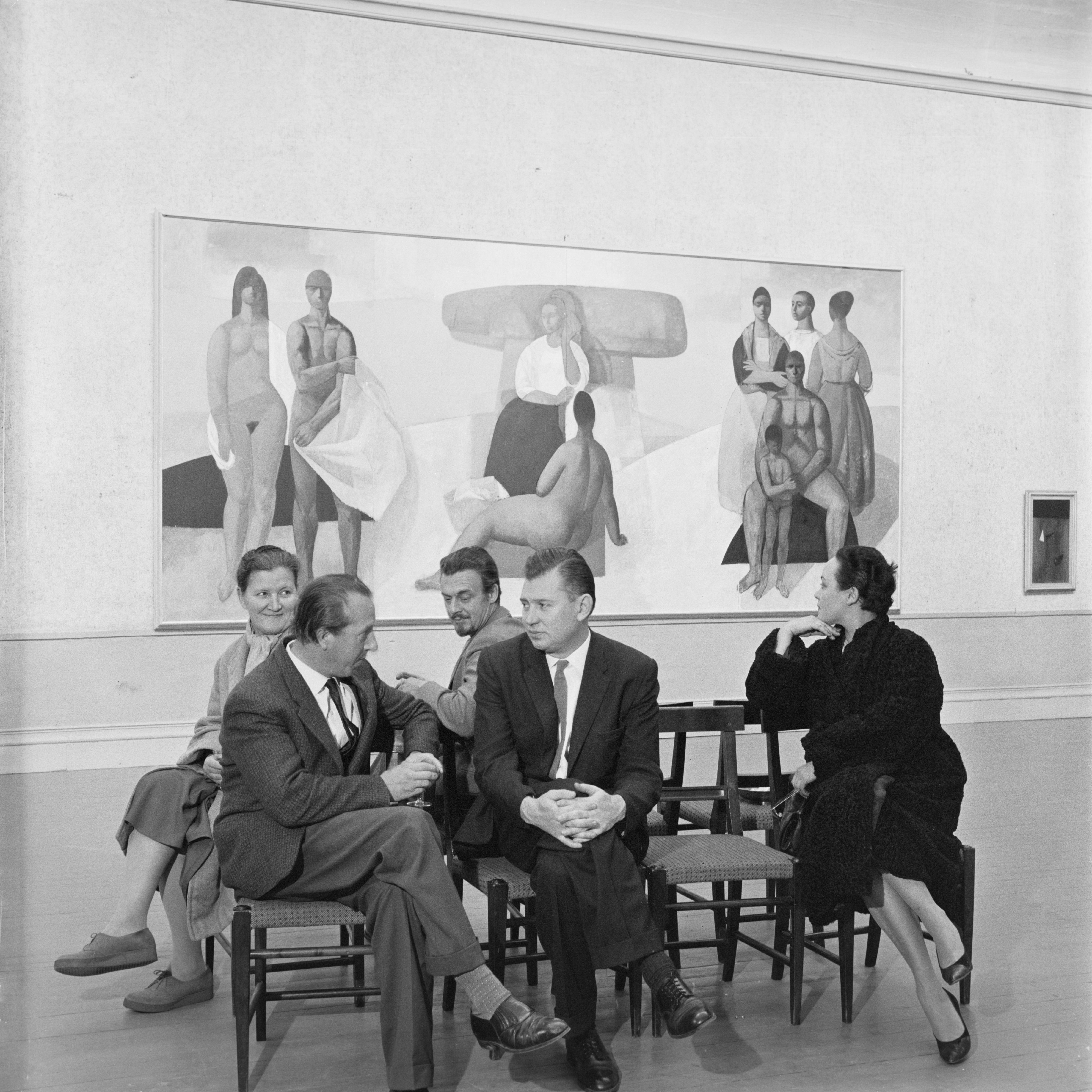 Taiteilijaliitto 58:n jäseniä liiton ensimmäisessä näyttelyssä Taidehallissa. Etualalla taiteilijat Unto Koistinen (1917–1994) ja Veikko Marttinen (1917–2003), taempana vasemmalla rouva Kanerva, Rolf Sandqvist (1919–1994) ja oikealla rouva Marttinen (Nora Mäkinen).